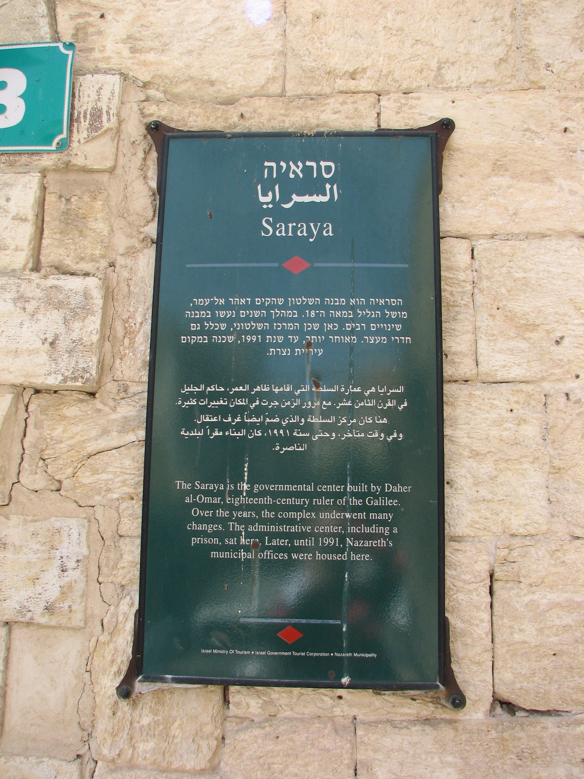 Saraya Building Nazareth was built by Daher el-Omar in 1740. The bulding was used as Governmental center בית הסראייה בעיר נצרת, הוא מבנה שהקים דאהר אל-עומר, שליט הגליל באמצע המאה ה-18, ואשר שימש כמרכז השלטוני בעיר. הבניין בין שתי הקומות הוקם בסביבות שנת 1740. הבניין שימש עד שנת 1991 כבית עיריית נצרת